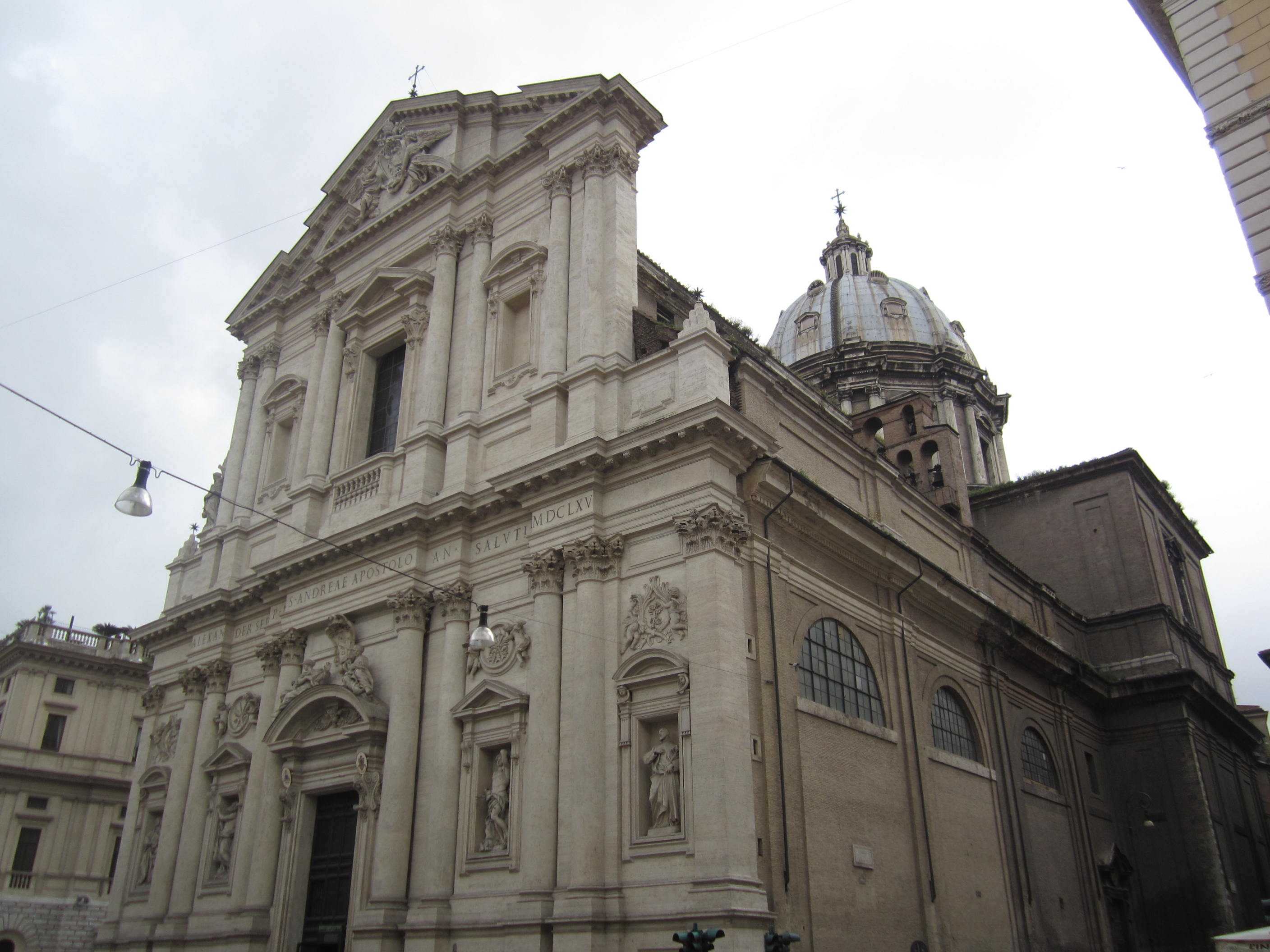 Basilica di Sant'Andrea della Valle, Roma